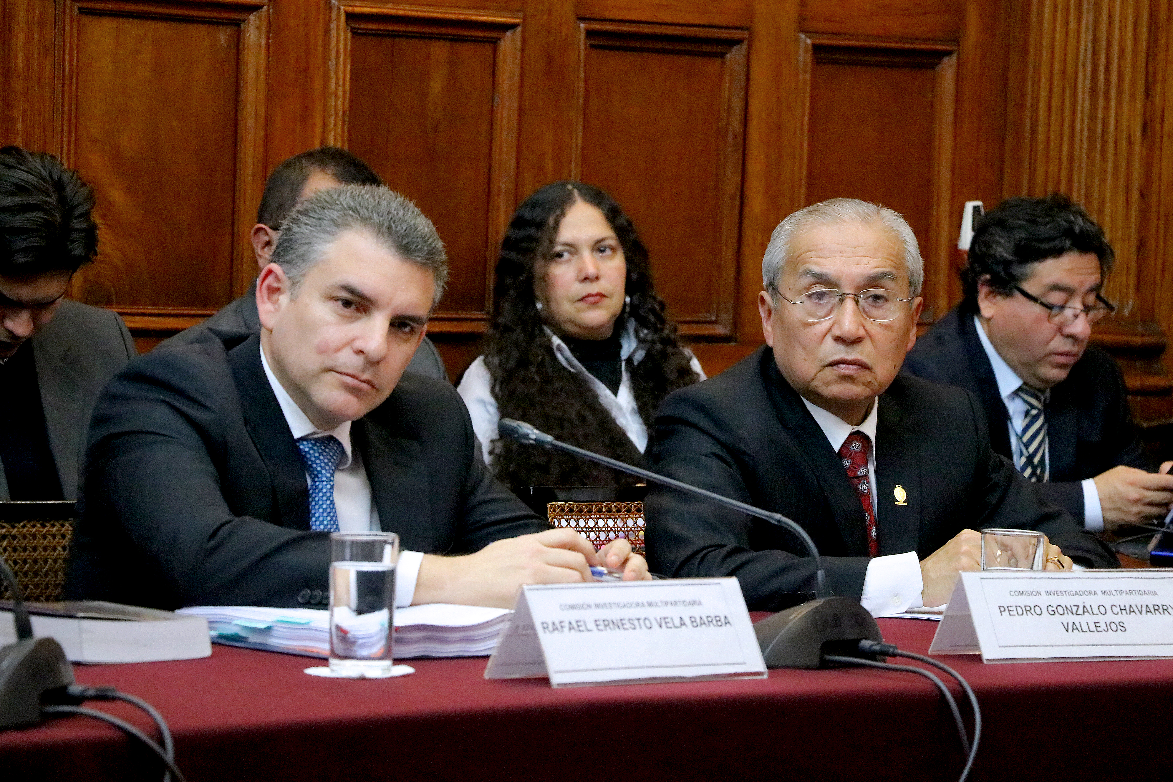 Rafael Vela y Pedro Chávarry en 2018